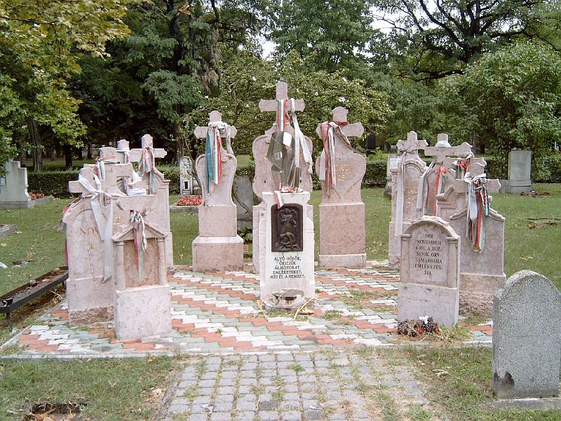 1956-os forradalmárok központi emlékhelye Budapesten. Kerepesi temető: 21